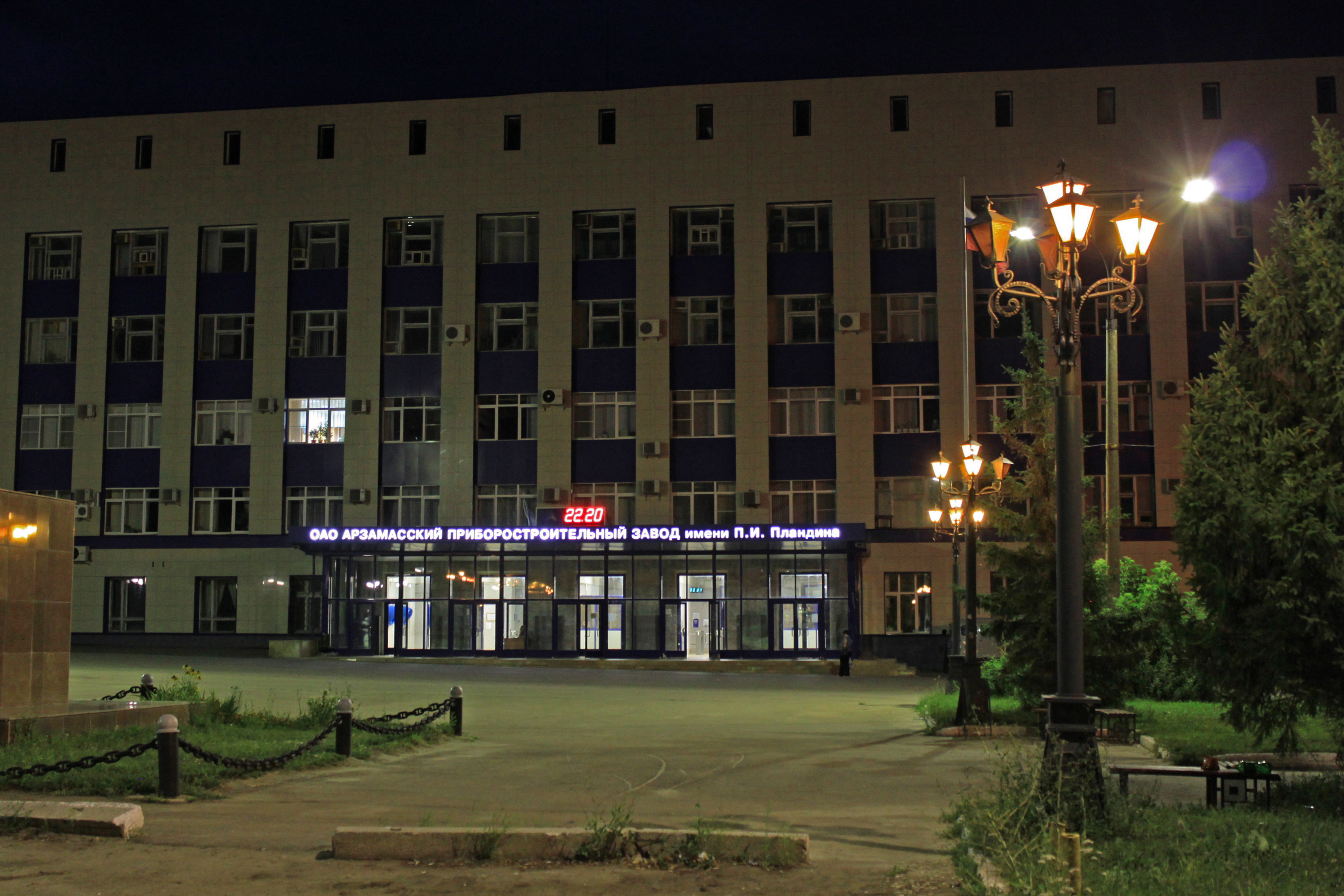 АПЗ